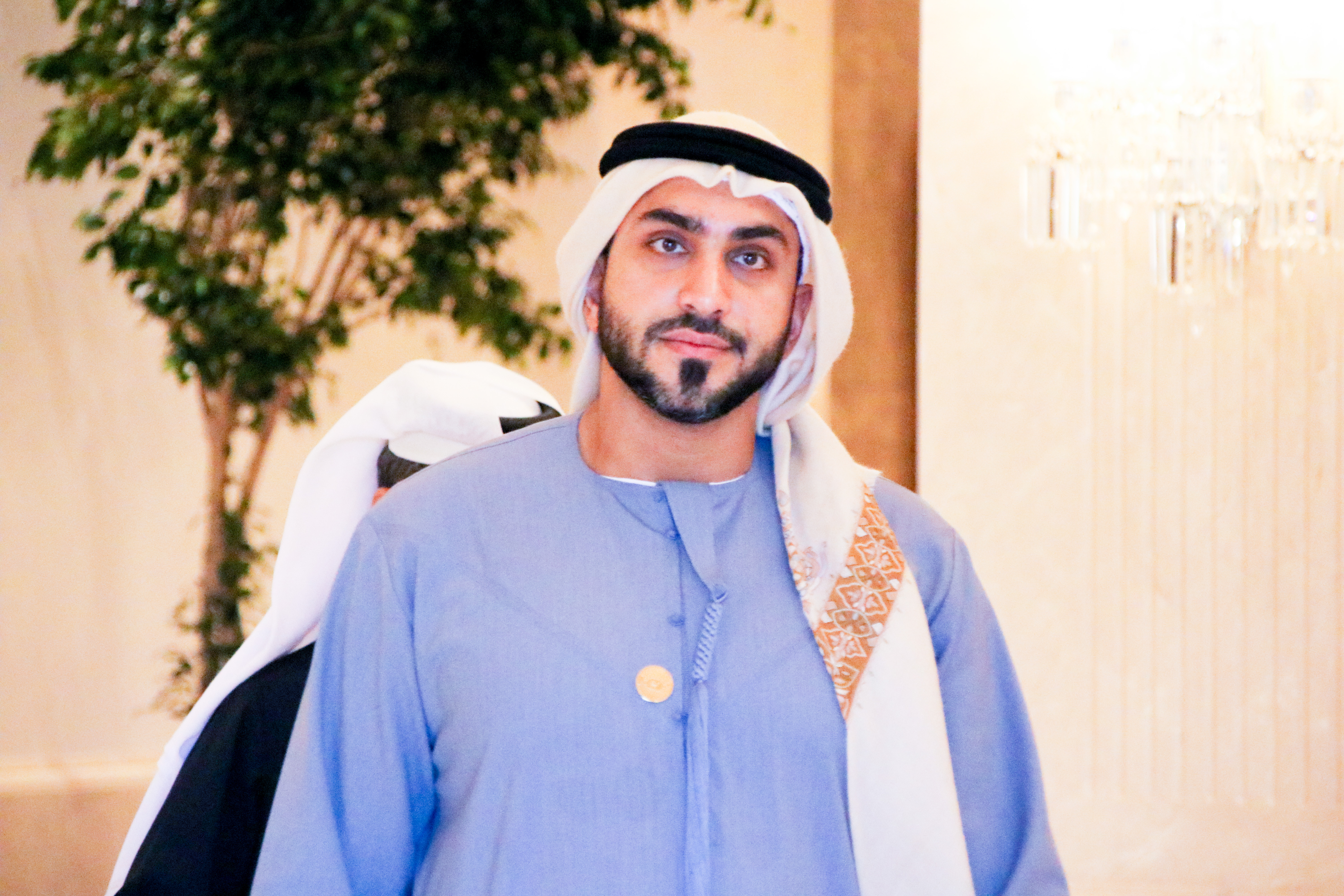 صورة لسمو الشيخ محمد بن فيصل القاسمي